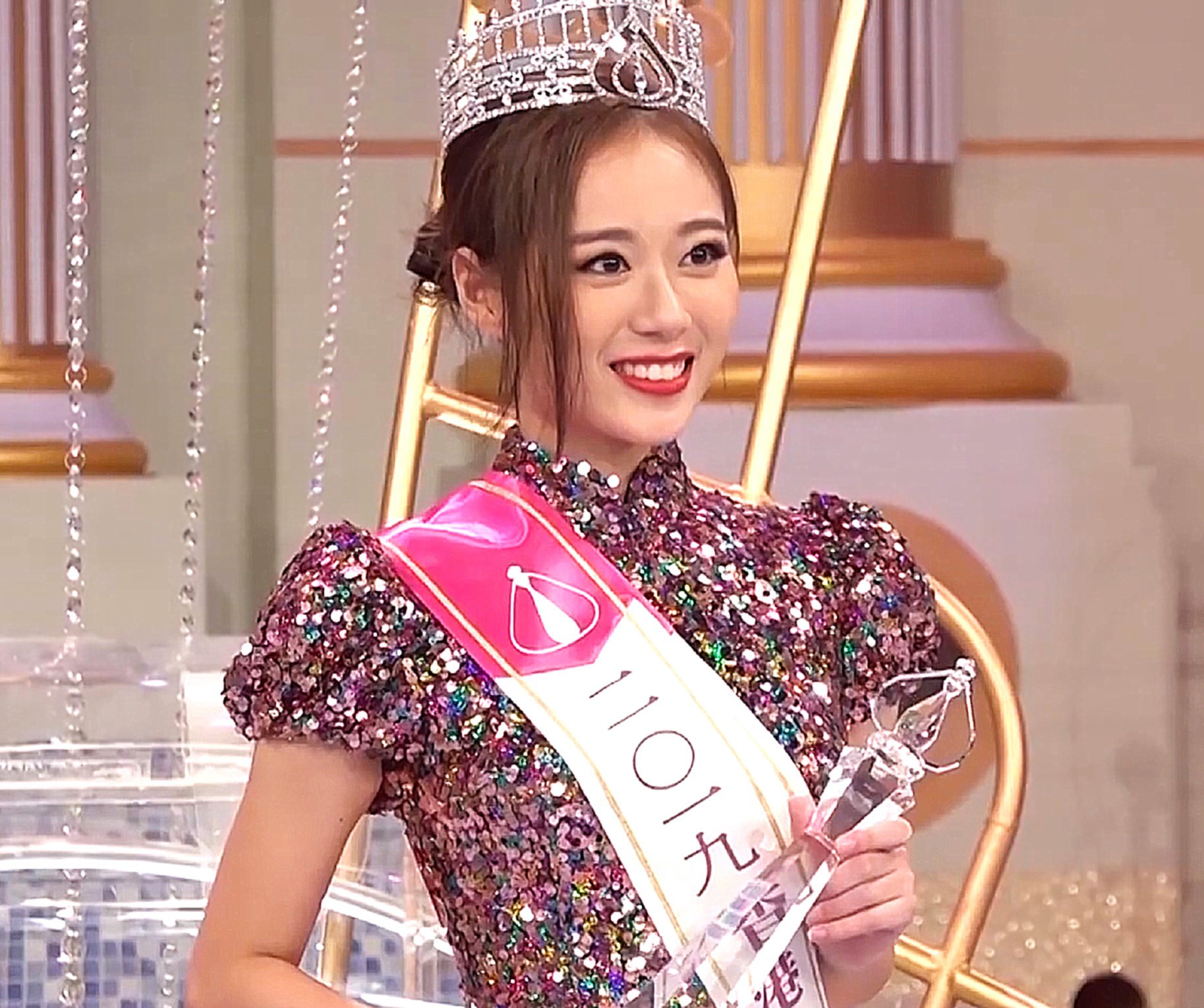 中文（香港）: 2019年度香港小姐競選亞軍及最上鏡小姐